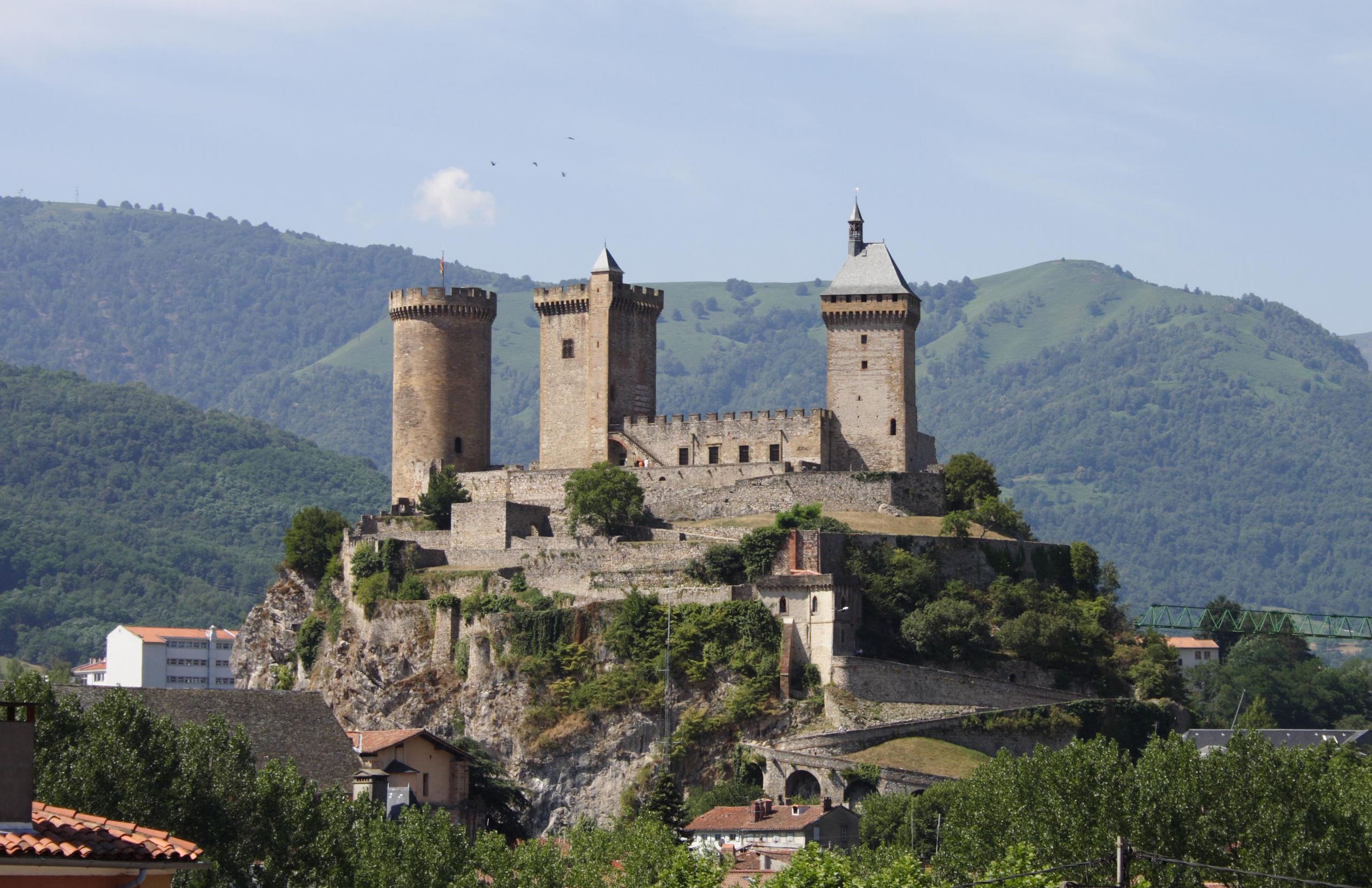 Château de Foix(Foix, France)